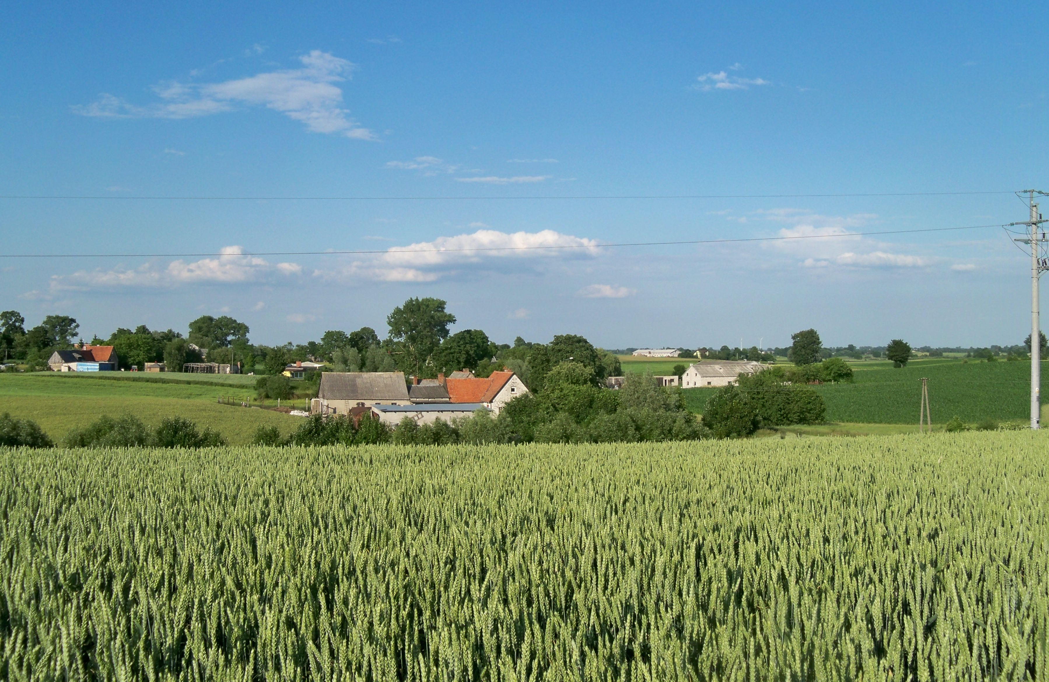 Blizienko, powiat wąbrzeski. Centralna część wsi.